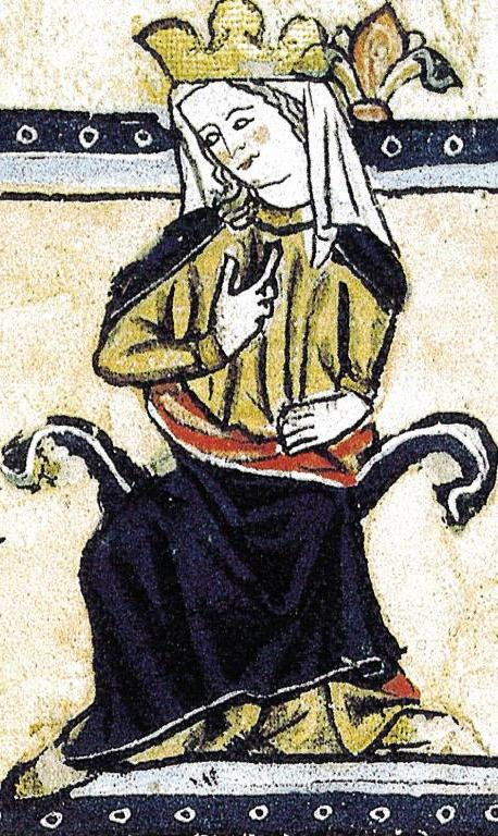 Фрагмент миниатюры из фолианта XIII века. Изображение Виоланты Арагонской, королевы Кастилии и Леона кисти неизвестного.